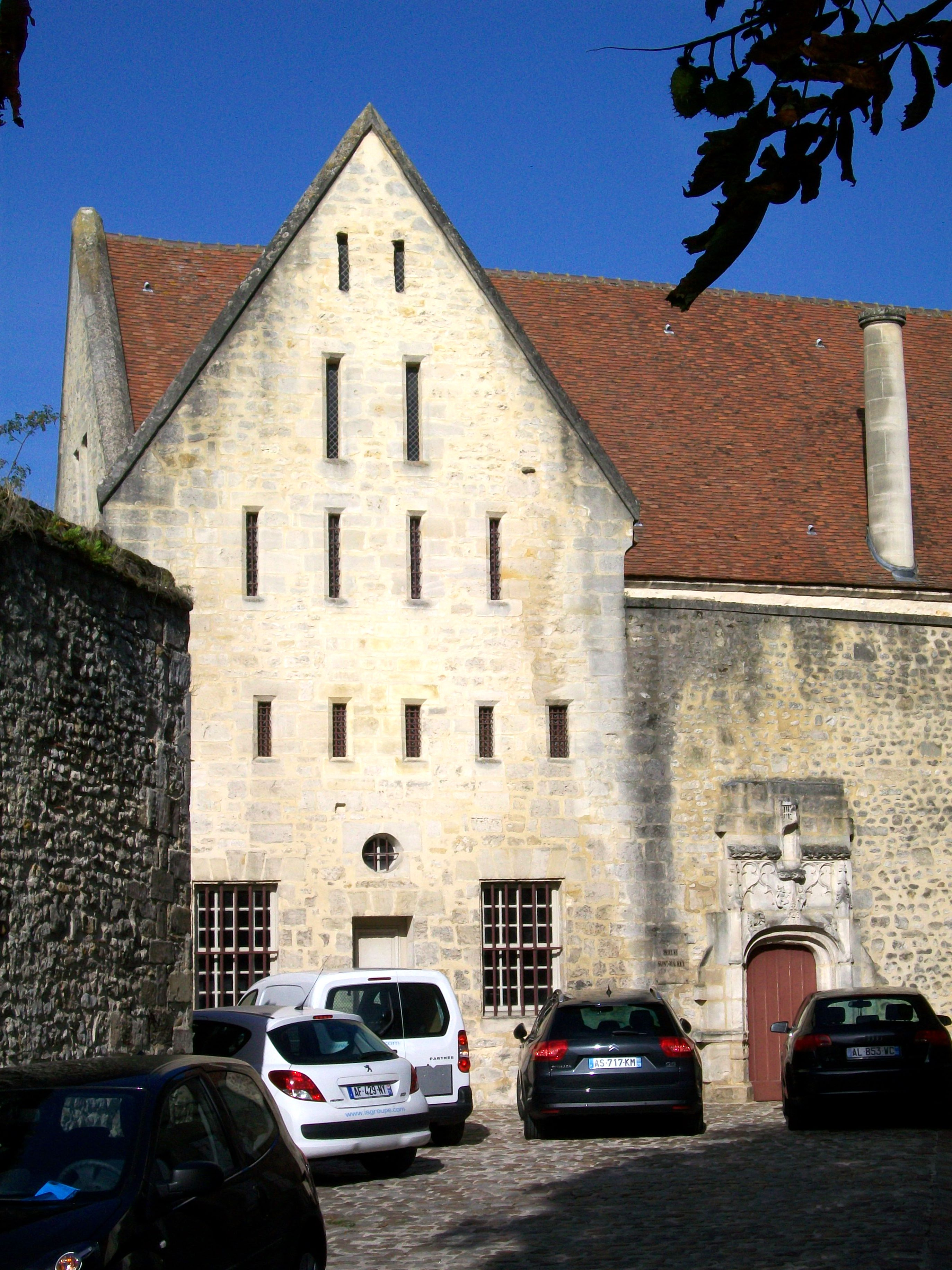 Prieuré St-Maurice, dortoir des moines vue depuis la cour.